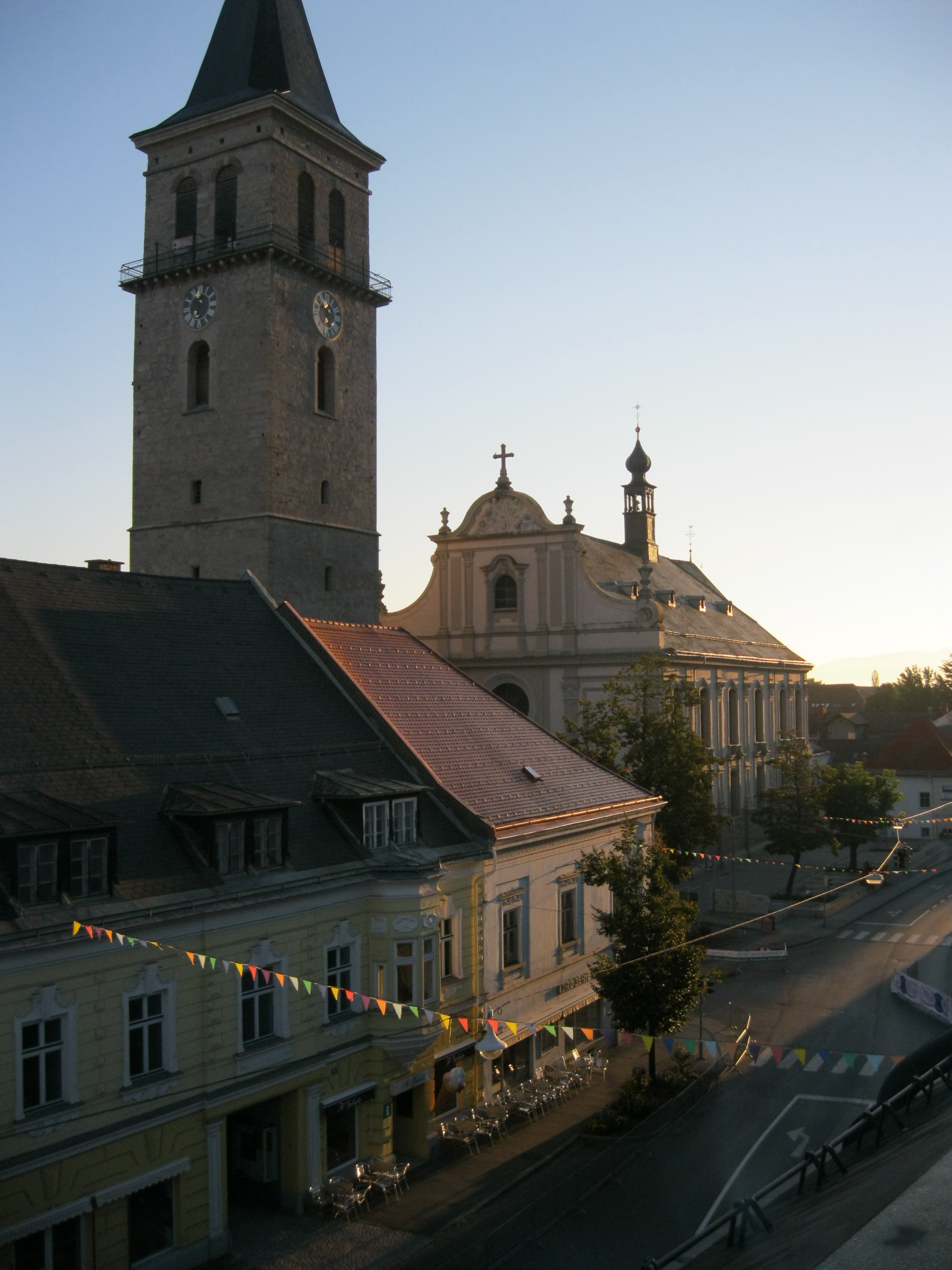 Stadtturm Judenburg, Steiermark Dieses Foto wurde im Rahmen des von Wikimedia Österreich unterstützten Projekts Wiki takes oberes Murtal erstellt. The making of this work was supported by Wikimedia Austria. For other files made with the support of Wikimedia Austria, please see the category Supported by Wikimedia Österreich. Object location47° 10′ 05.64″ N, 14° 39′ 40.81″ E